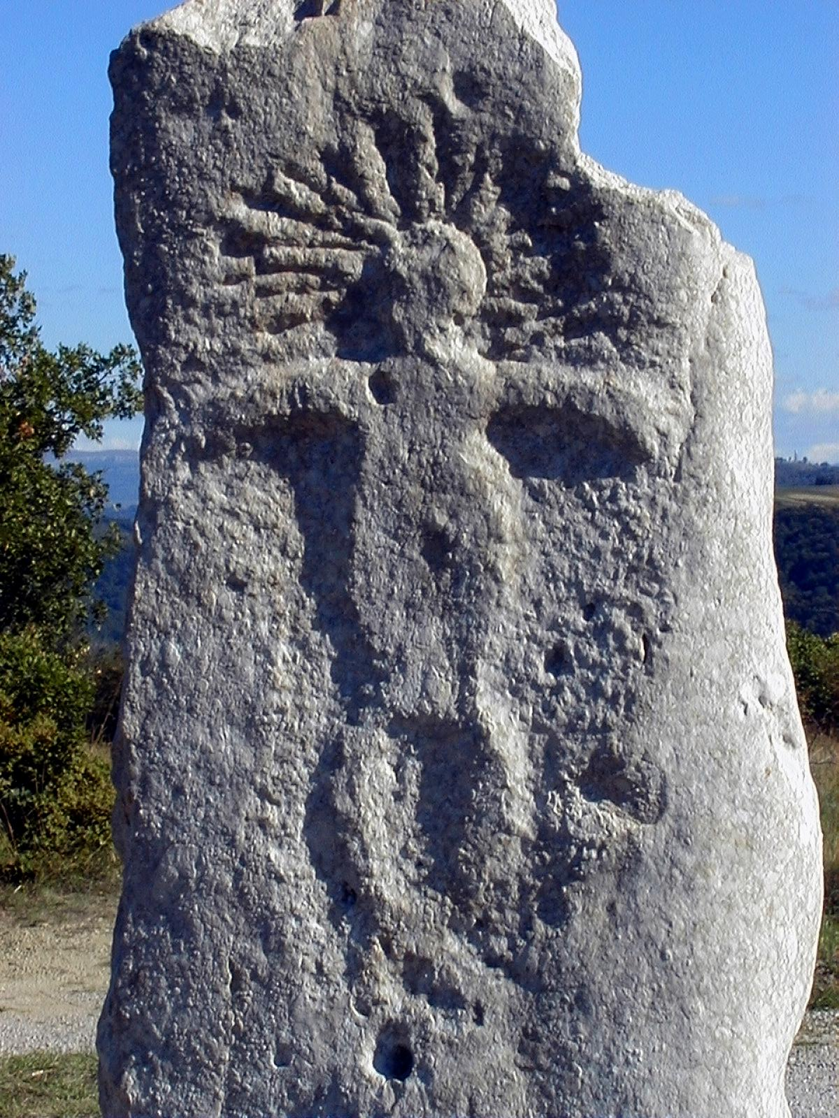 Krkavčanski kamen